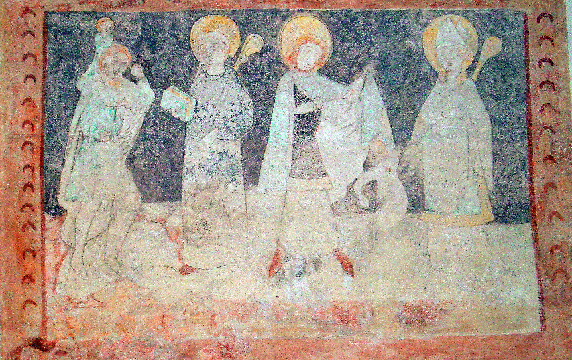 Ersheimer Kapelle, mittelalterliches Wandfresko